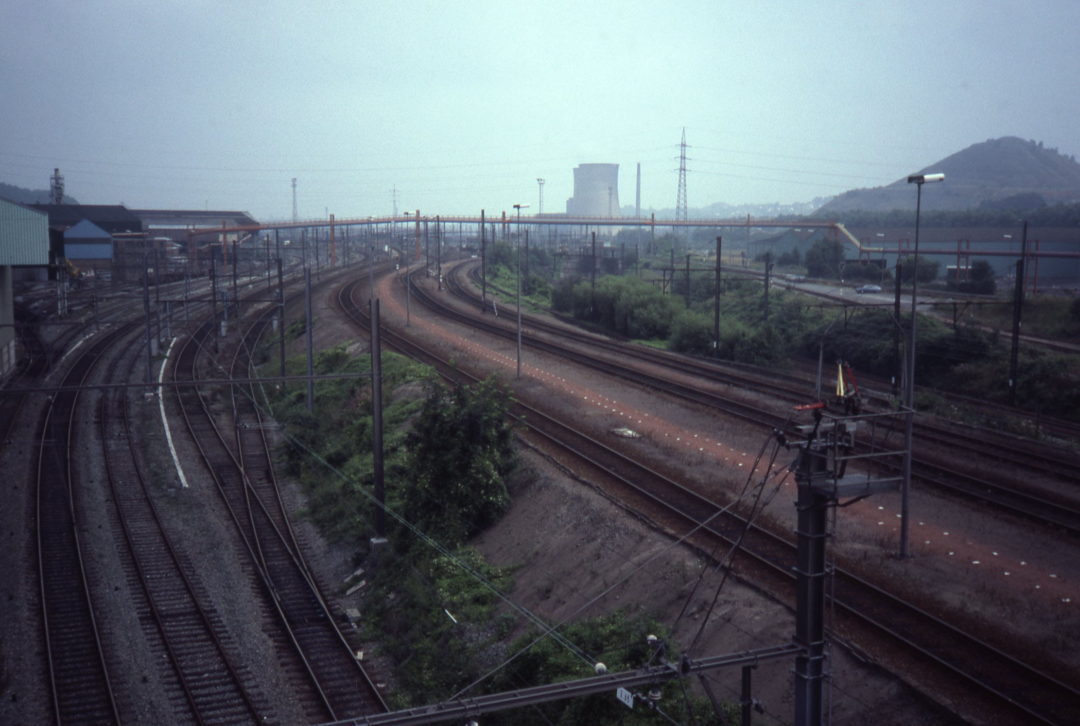 Uitzicht op spooremplacement vanuit een brug bij Marchienne-au-Pont. De terril rechts in beeld is later afgevlakt.